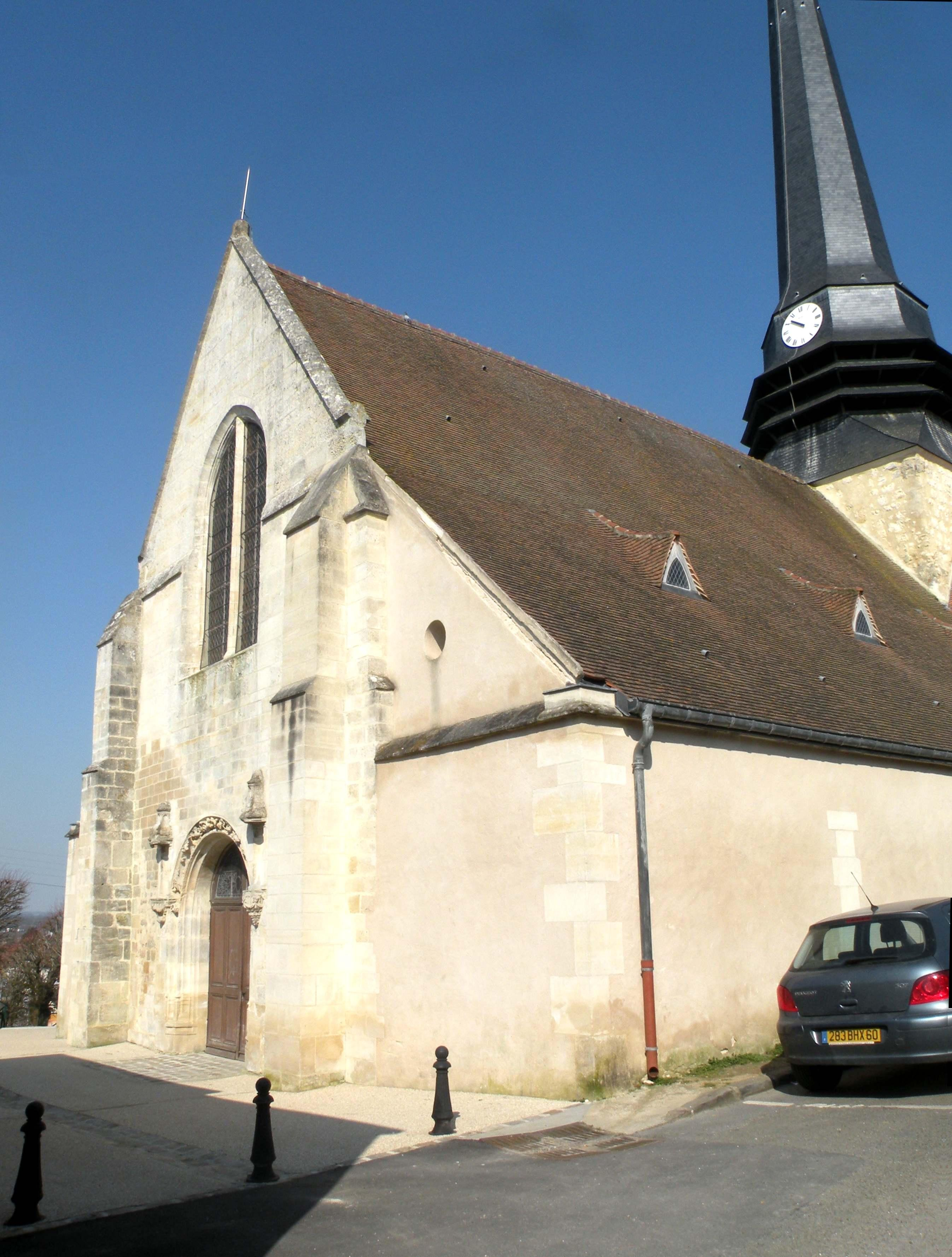 extérieur de l'église st Martin d'Amblainville